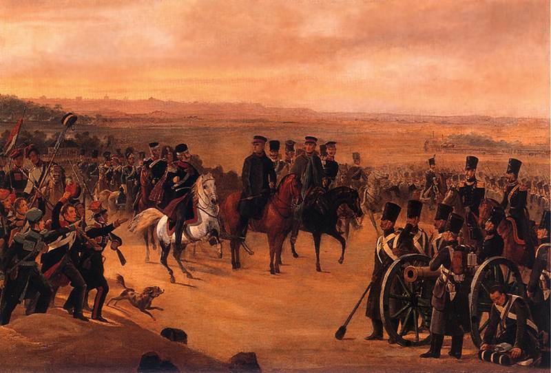 January Suchodolski